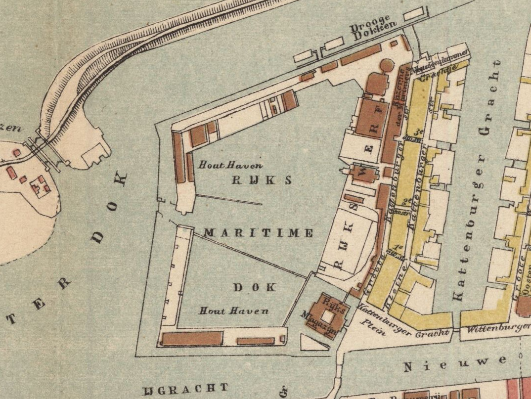 Plattegrond uit 1875 van de rijkswerf op Kattenburg, Amsterdam. Uitsnede van de Plattegrond van Amsterdam van A. Braakensiek uit 1875.